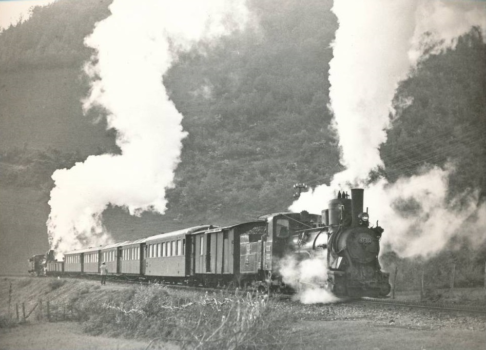 Dampfbetrieb auf der Zahnstangenstrecke am Komarsattel mit einer Dampflokomotive der Baureihe JŽ 97 und einer Schiebelokomotive.